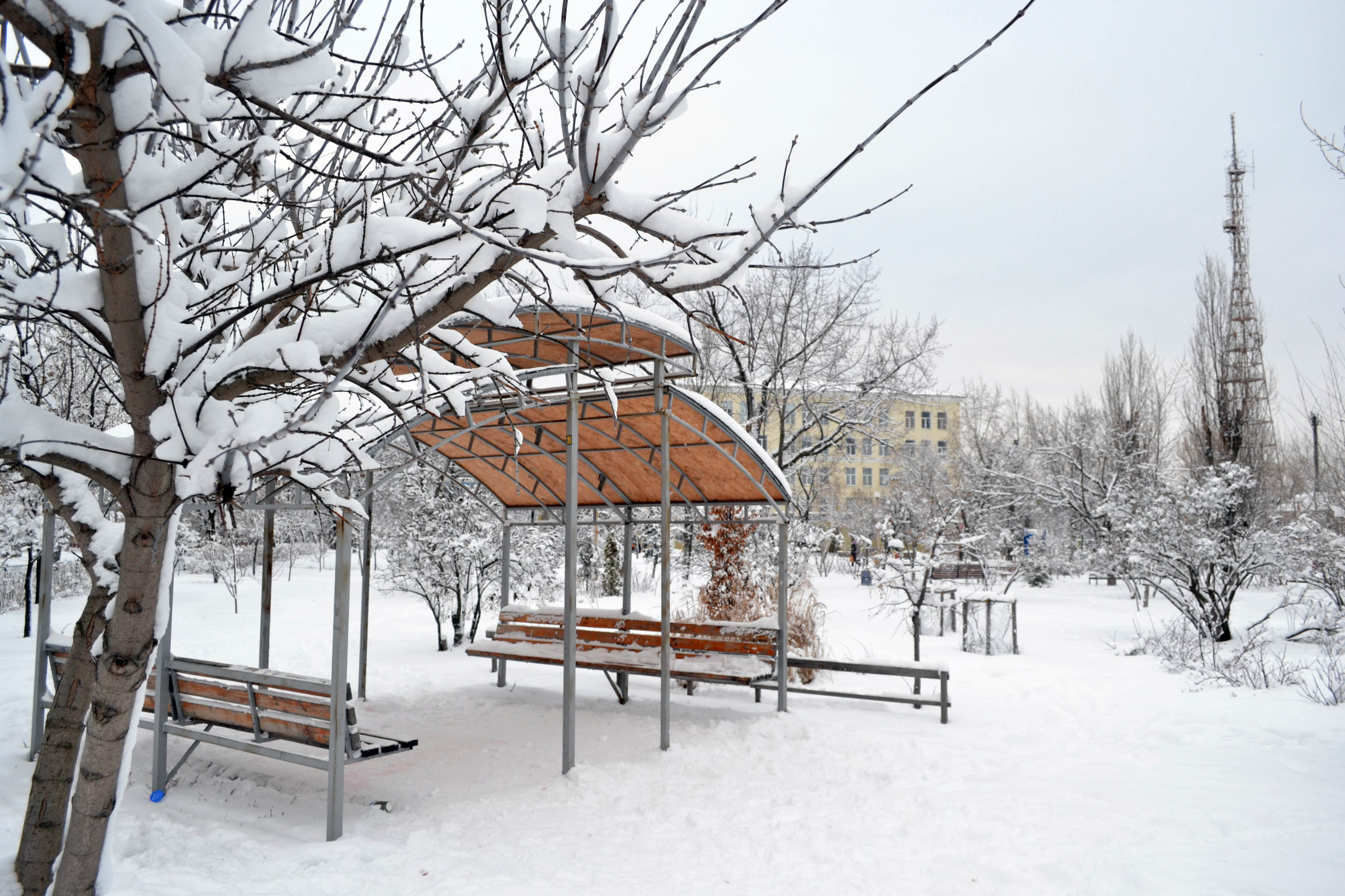 Зимовий Гоголь-сквер. Сєвєродонецьк